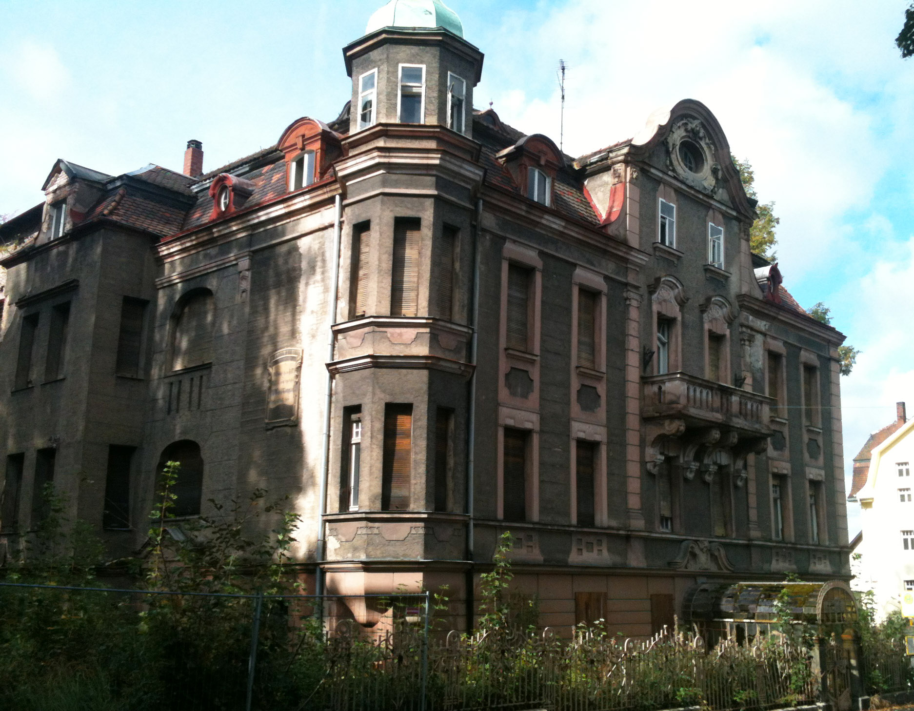 Fabrikantenvilla Carl Schumann, mit Giebel und Turm-Erker, bez. 1905; zugehörig Gartenpavillon mit Mansarddach; rückwärts an die Villa anschließender dreiflügeliger Verwaltungsbau, überwiegend Um- und Neubauten der 1920er Jahre; schmiedeeiserner Gartenzaun. Momentan unbewohnt, schlechter Zustand, einsturzgefährdet.This is a photograph of an architectural monument.